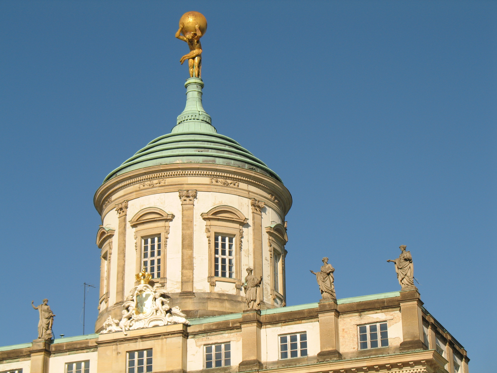 Die Kuppel des Alten Rathauses näher betrachtet